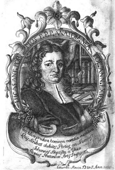 Ritratto di Lucantonio Porzio